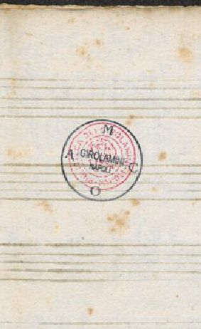 Stempel der Biblioteca dei Girolamini in Neapel: roter Kreis mit Figur grauer Kreis mit dem Eintrag "Girolamini Napoli" (hier als Kennzeichen der Musikaliensammlung über den roten Stempel gesetzt) Ausschnitt eines Notenblatts von 1701